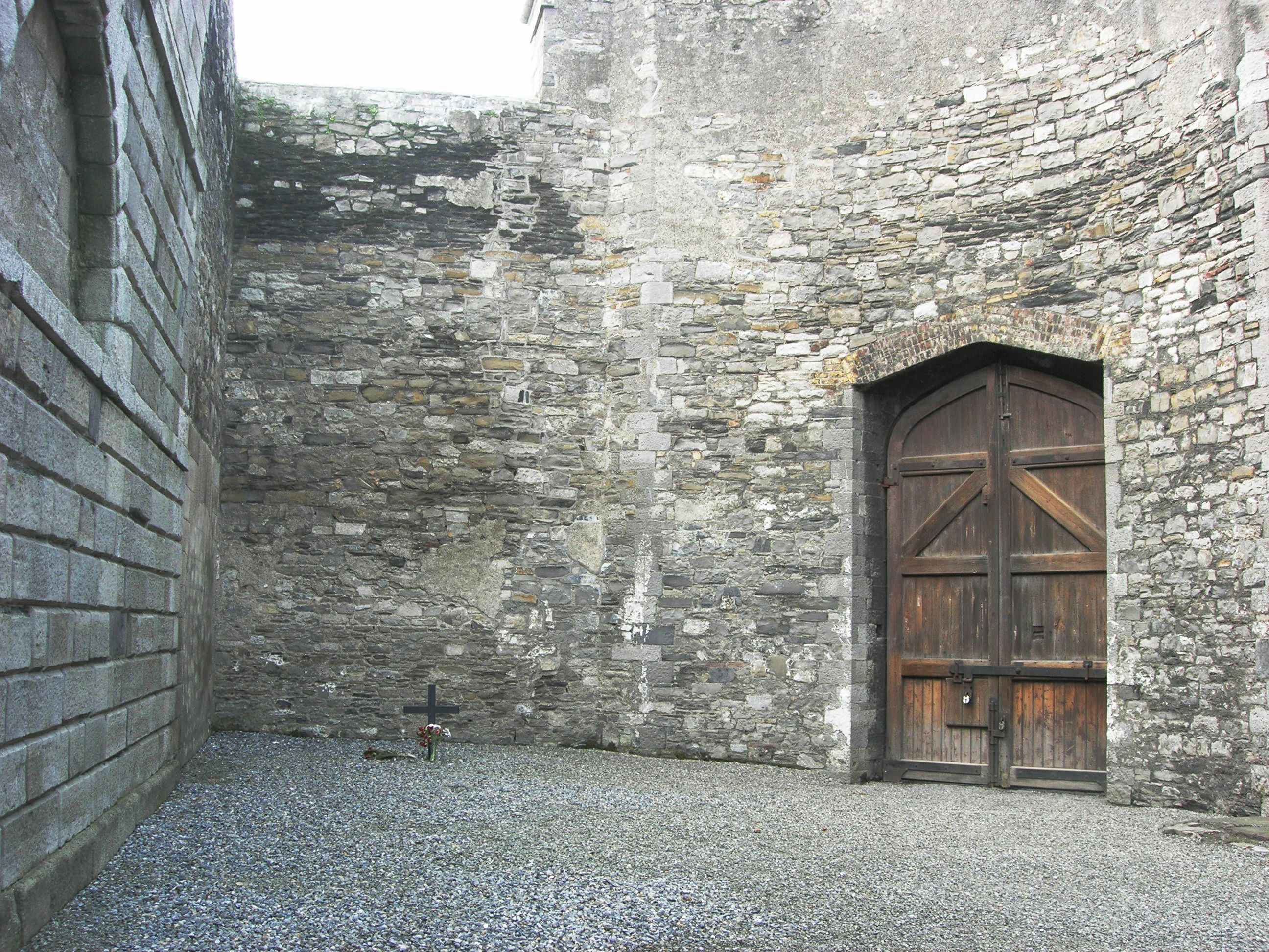 Description =Prison de Kilmainham. Cour ou étaient fusillés les prisonniers. Source =Photo taken by Remi Jouan Date =Mai 2006 Author =Remi Jouan